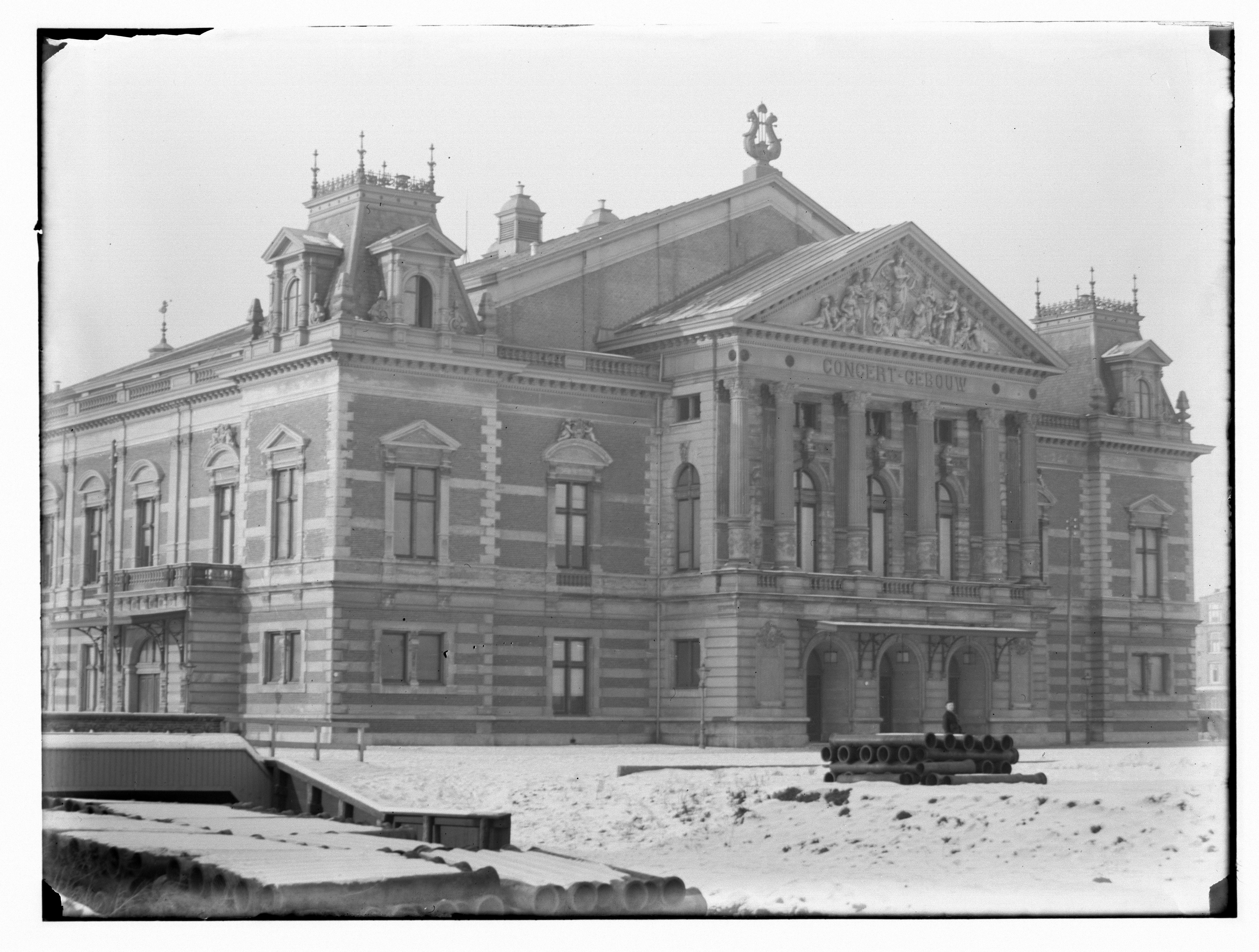 Beschrijving Baerlestraat (Van) 98 Concertgebouw. Links: Jan Willem Brouwersplein``, gezien vanaf Museumplein Documenttype foto Vervaardiger Olie``, Jacob (1834-1905) Collectie Collectie Jacob Olie Jbz. Datering 1891 Geografische naam Van Baerlestraat Gebouw Concertgebouw Inventarissen Afbeeldingsbestand 010019000225 Generated with Dememorixer